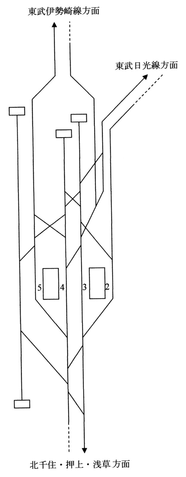 自作の線路図です